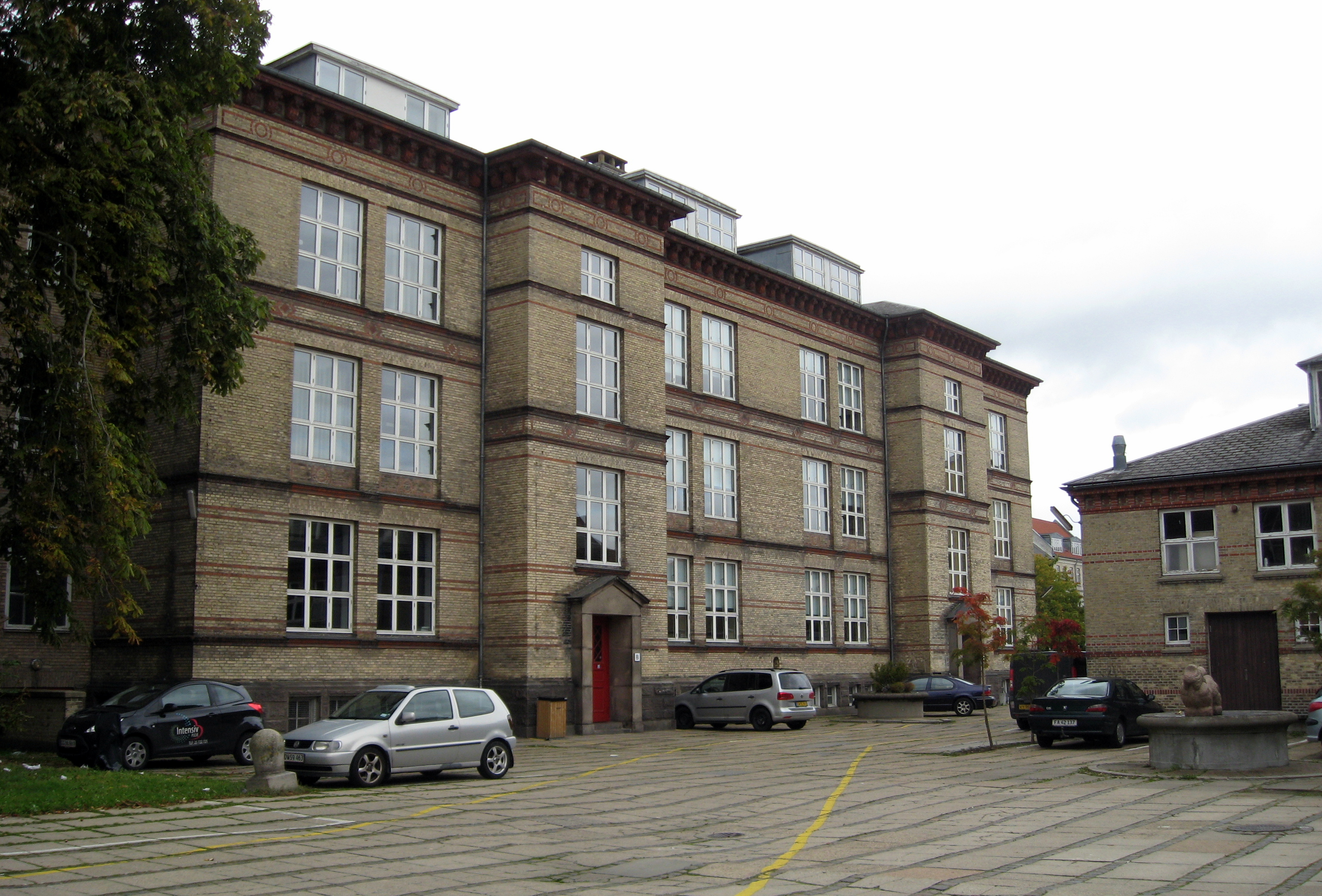 VUC (voksenuddannelsescenter) Aalborg